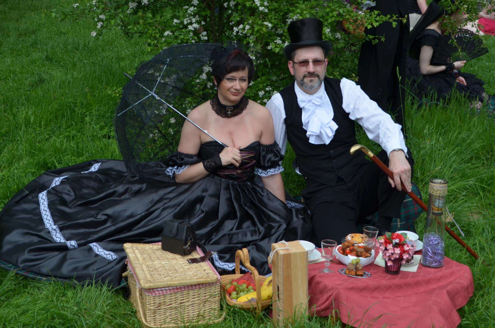 Viktorianisches Picknick @ WGT2013 / WGT